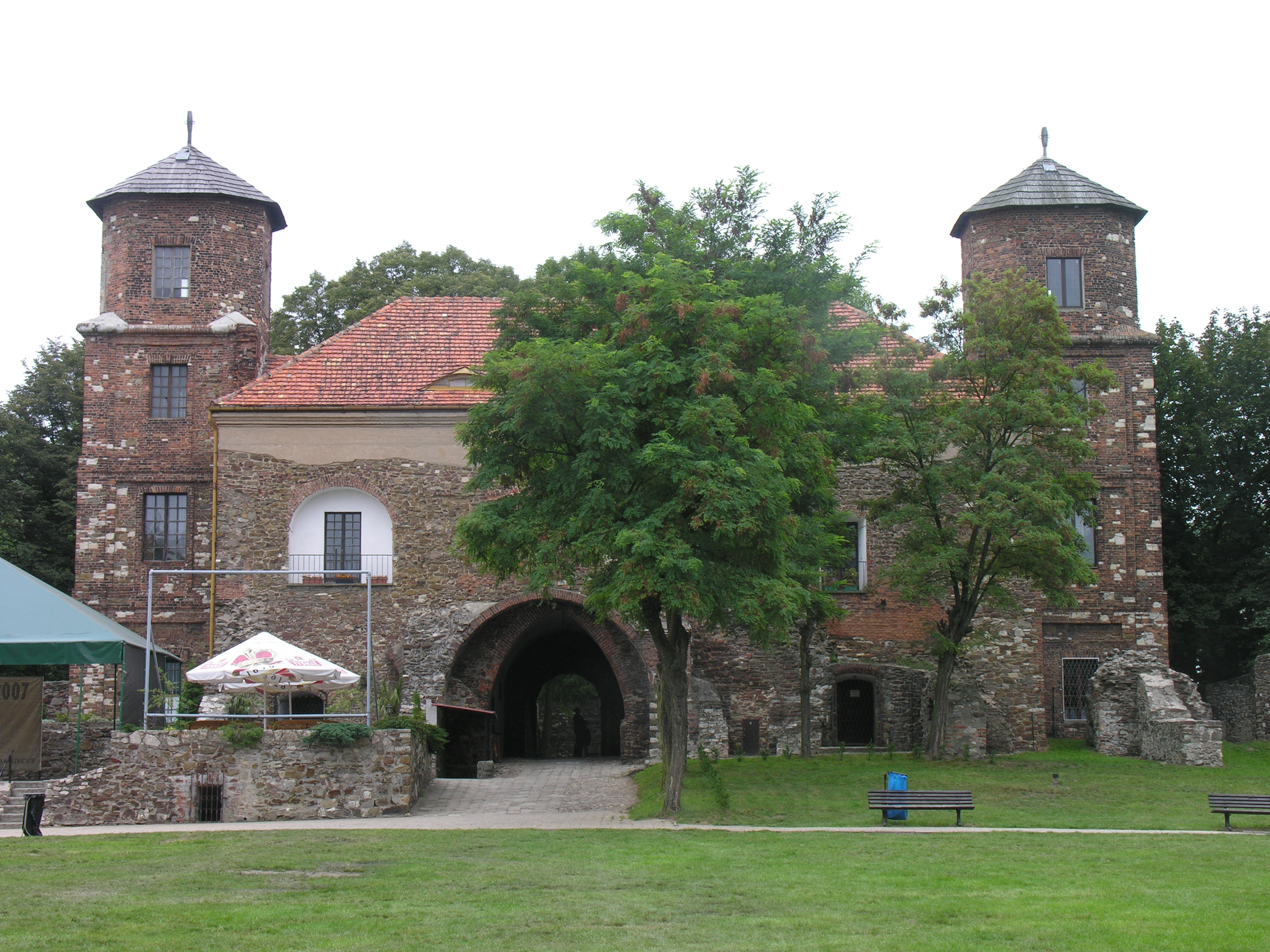 Dziedziniec zamku w Toszku